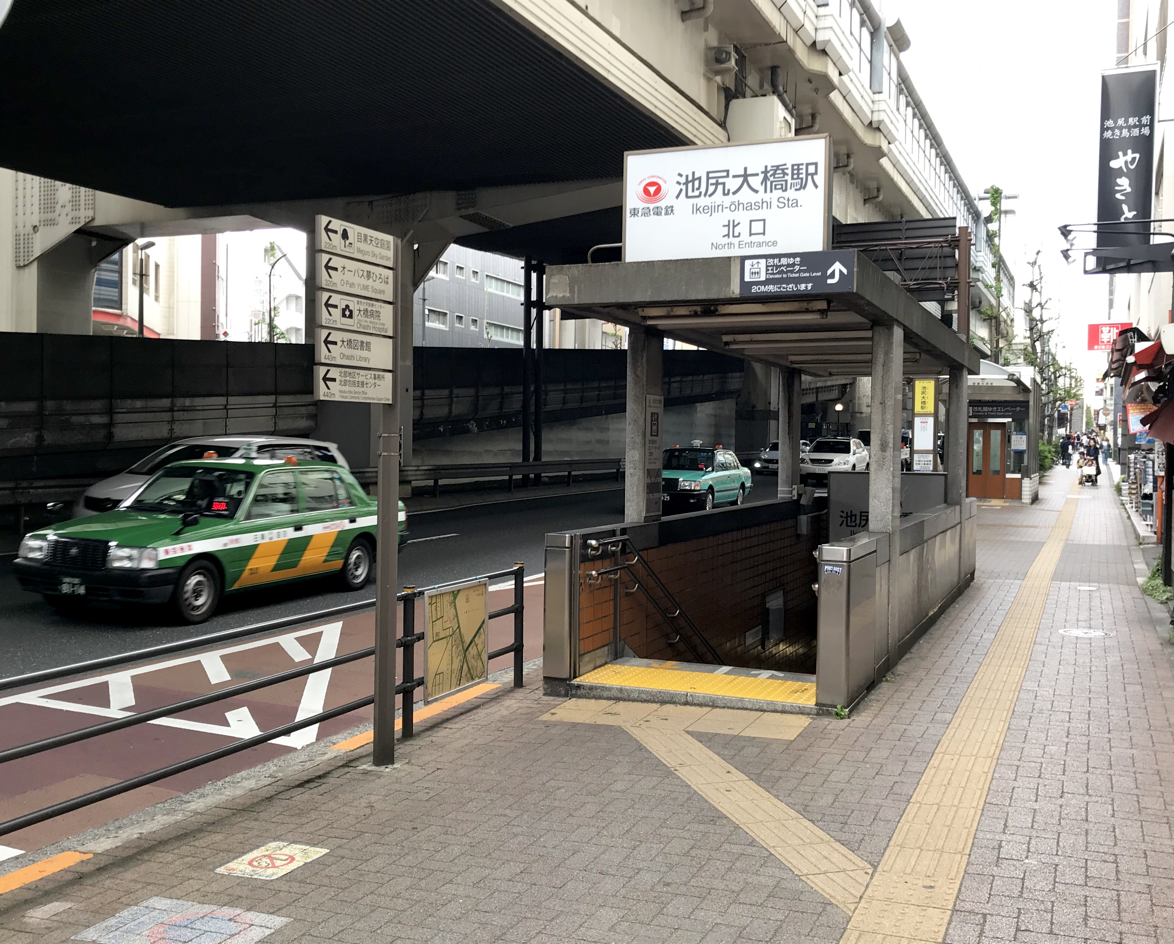 東急田園都市線池尻大橋駅北口